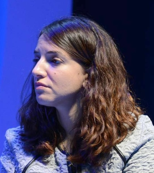 נשיא מדינת ישראל ראובן ריבלין בכנס ברל כצנלסון לסובלנות ולמאבק בגזענות ומרואיין על ידי לוסי אהריש